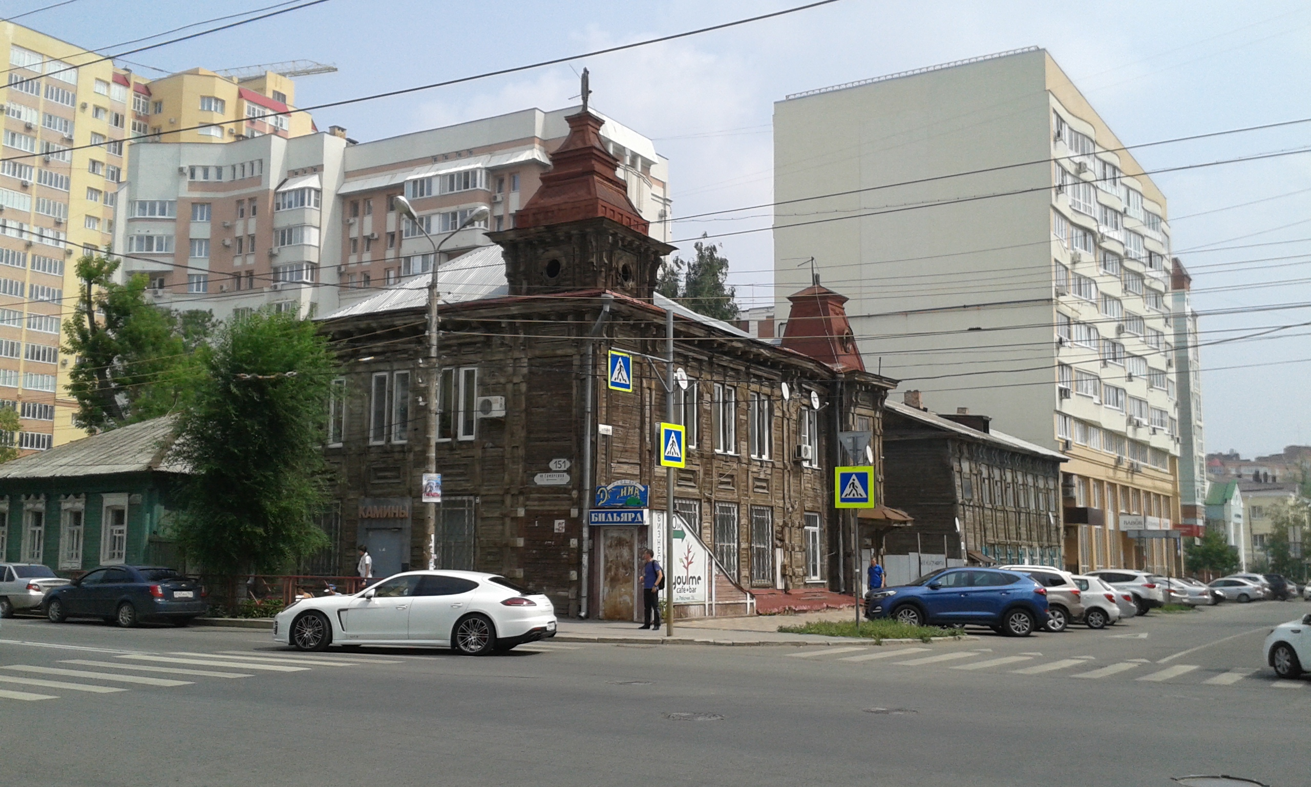 Дом Прахова, Самара, Самарская/Рабочая улица, 151/22